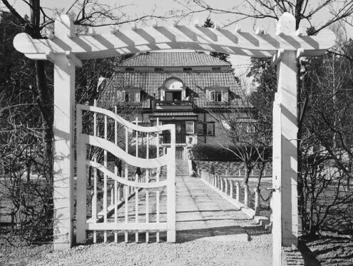 Villa Wållgren på Prästgårdsvägen 1 ritades år 1908 av arkitekt Ivar Callmander. Här bodde operasångare Emile Stiebel åren 1927-1941.